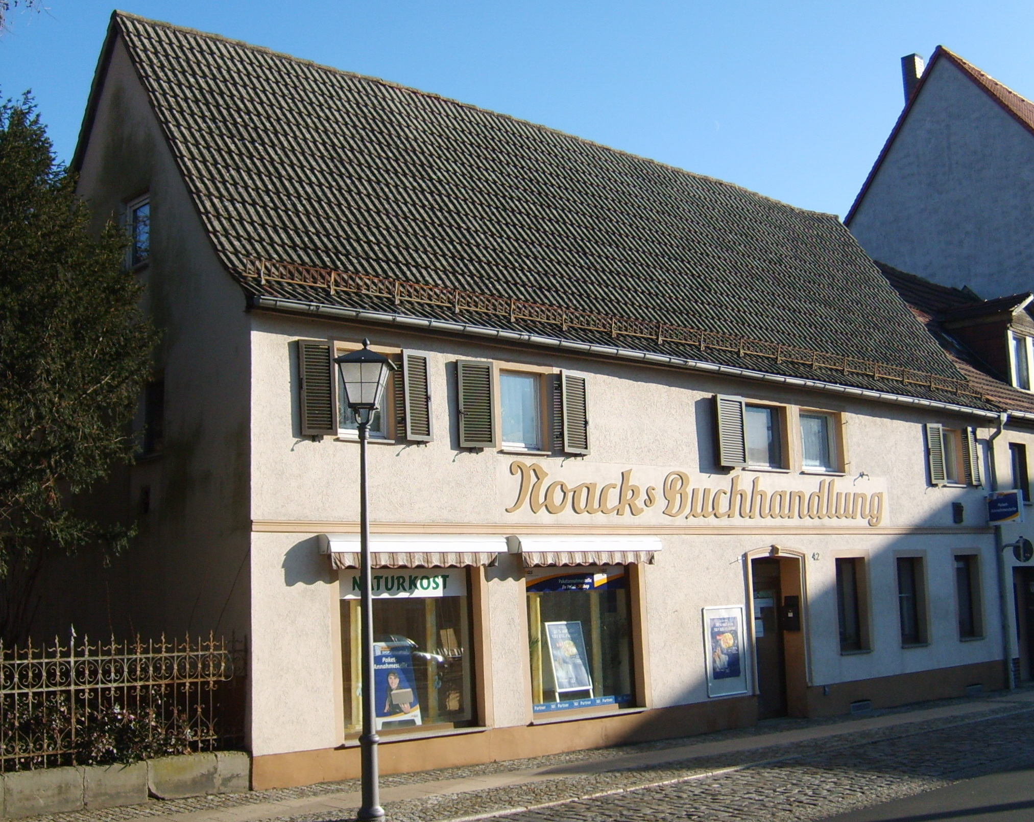 Noack´s Buchhandlung in Elsterwerda, das nachweislich älteste Schulhaus der Stadt